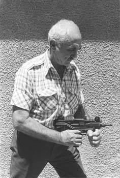 ישראל גלילי (בלשניקוב) אוחז במיני עוזי.